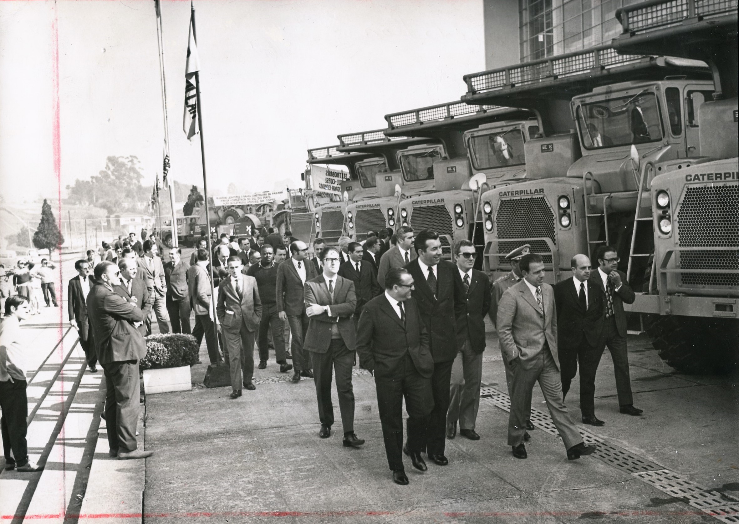 Fotografia do Fundo Correio da Manhã, sob a guarda do Arquivo Nacional.